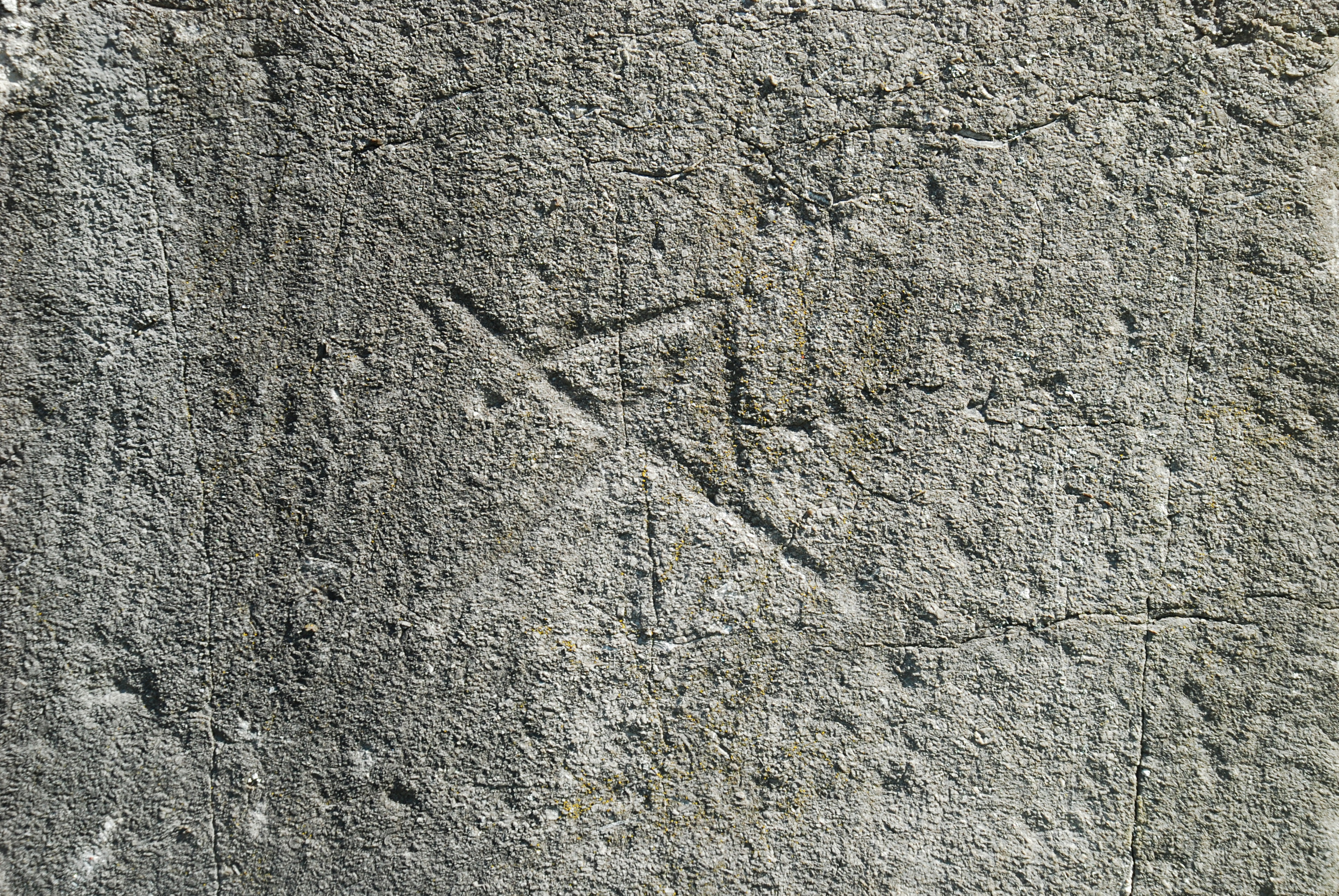 Belgique - Brabant wallon - Genappe - Glabais - Église Saint-Pierre